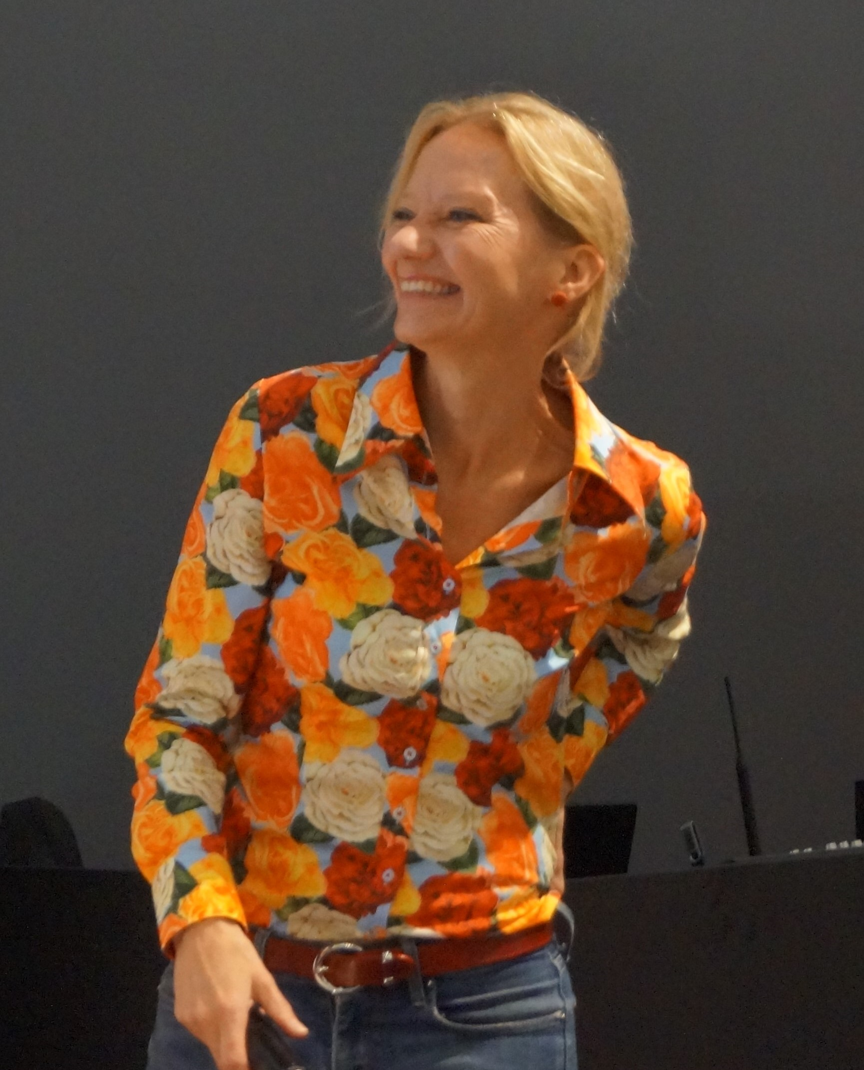 Karin Betz auf der Frankfurter Buchmesse 2019 Personality rights warningAlthough this work is freely licensed or in the public domain, the person(s) shown may have rights that legally restrict certain re-uses unless those depicted consent to such uses. In these cases, a model release or other evidence of consent could protect you from infringement claims.